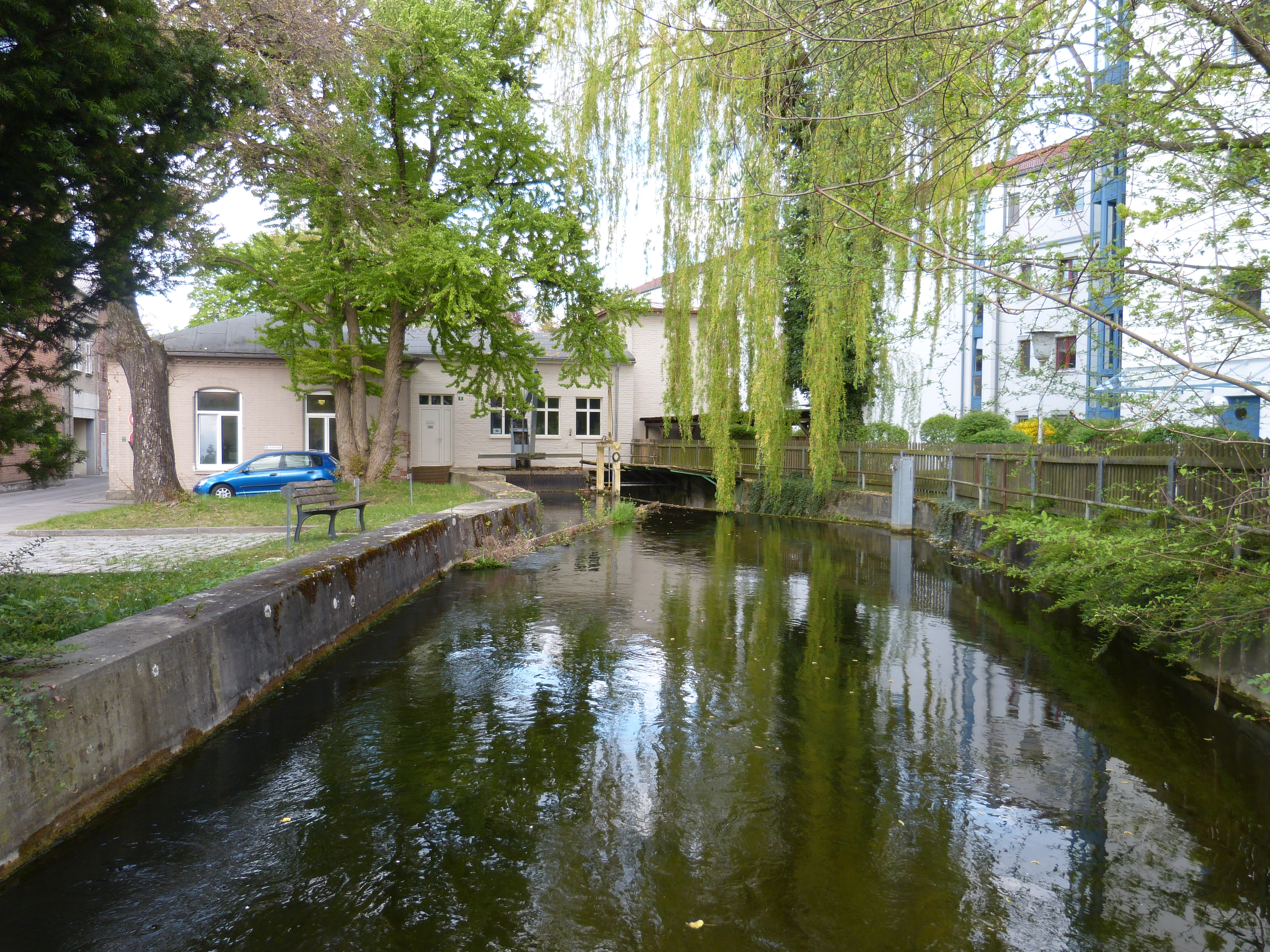 Das "Kraftwerk Limmert Mühlbach" am Mühlbach bei dem Unternehmen Eberle an der Eberlestraße in Augsburg-Pfersee.